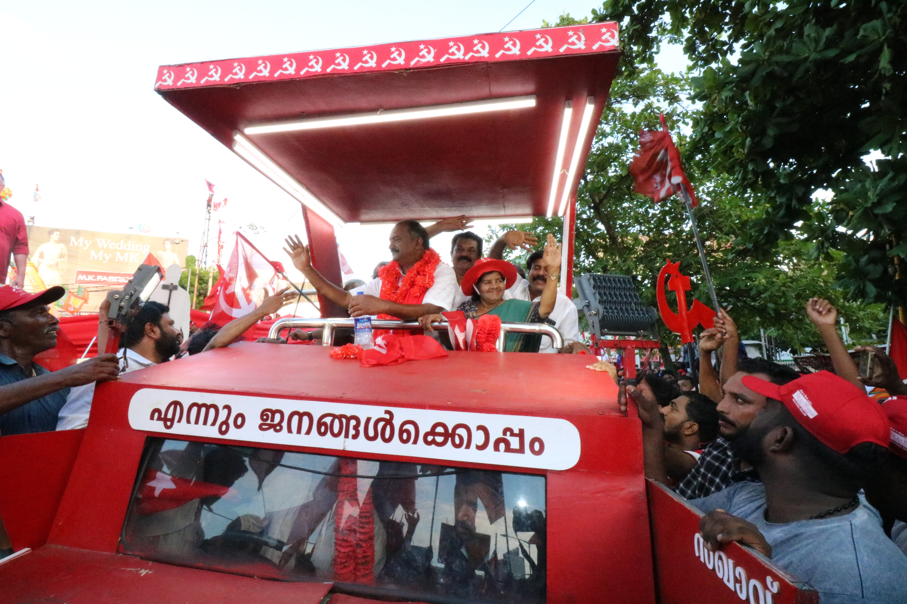 2019-ലെ ലോകസഭാ തെരഞ്ഞെടുപ്പിന്റെ പരസ്യ പ്രചാരണത്തിന്റെ കൊട്ടിക്കലാശം കൊല്ലത്ത്